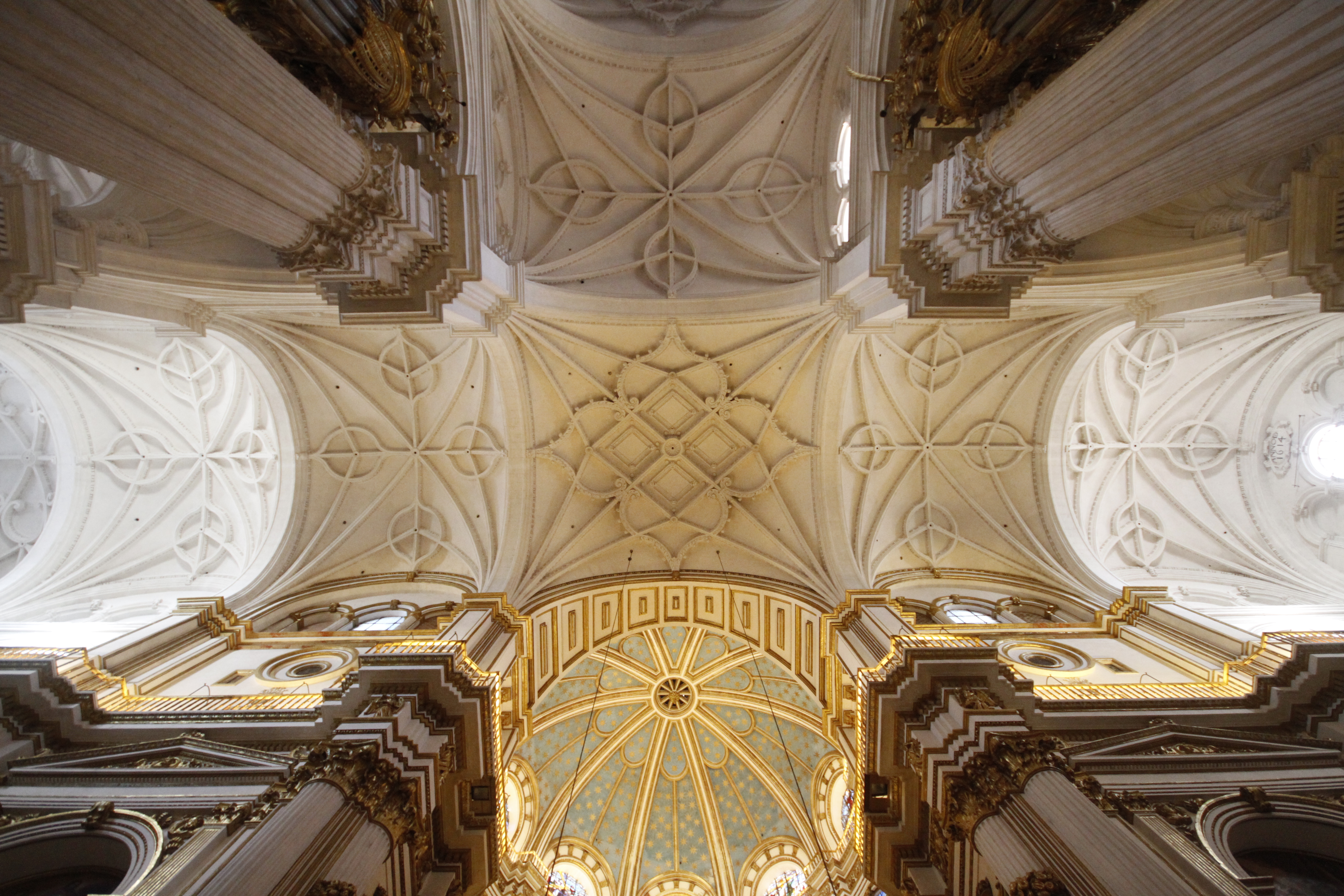 Teto da Catedral